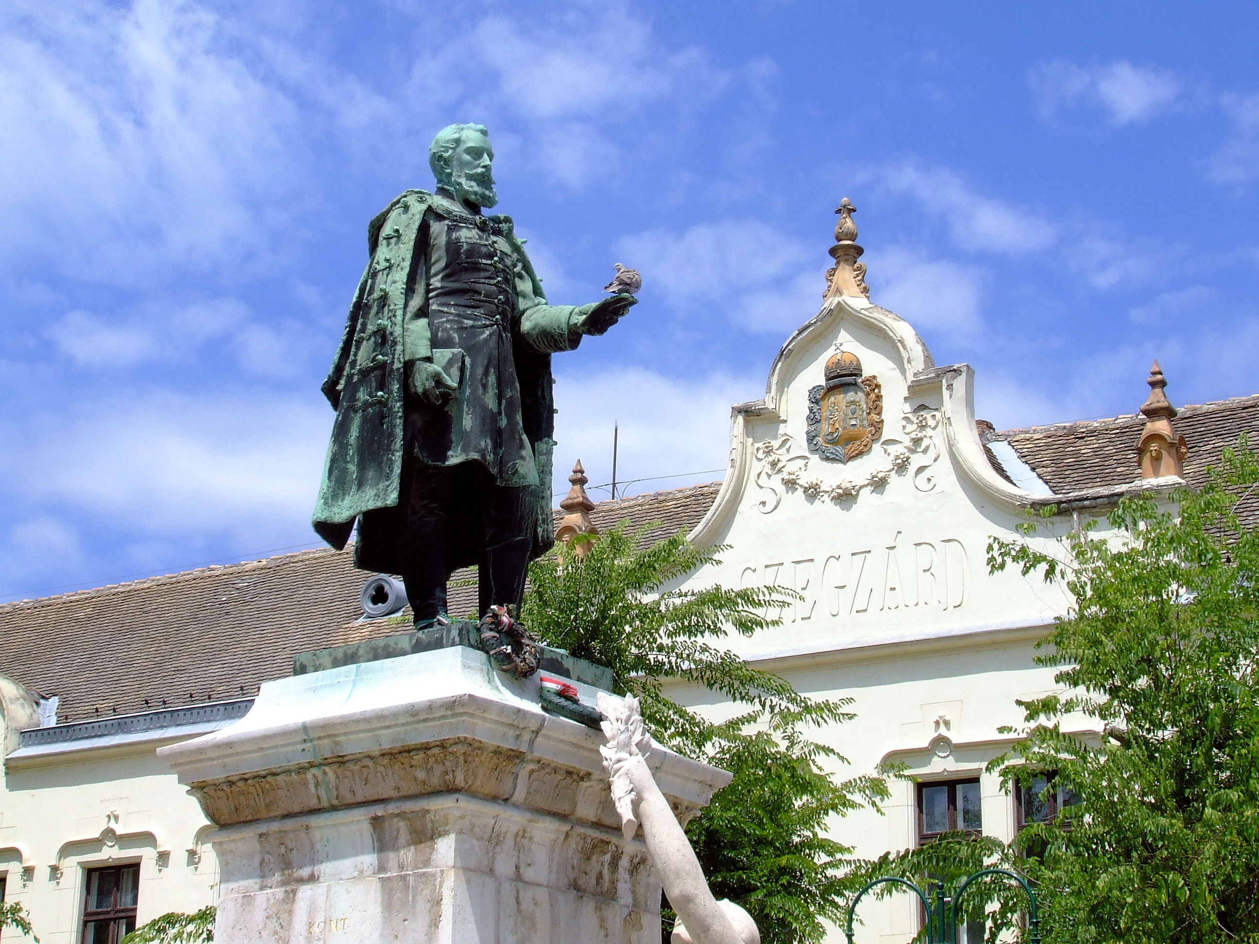 Garay János szobra Szekszárdon. Szárnovszky Ferenc (1863–1903) alkotása. (1898) Műemlék 878. Garay János 1812-ben született Szekszárdon. A szekszárdi gyermekkor meghatározóvá vált számára, intim családiasság, a kevéssel megelégedés ájtatos morálja, a tekintélytisztelet (megannyi biedermeier vonás), a német irodalom erősebb kultusza s általában mindaz, ami életművét Czuczorétól, Vörösmartyétól megkülönbözteti: polgári származásának következménye. Forrás: csatolna.hu. + Szegzárd Szálló. Szecessziós saroképület. Műemlék ID 8756. A Garay térre néző homlokzat középrizalitját Szekszárd város pirogránitból készült címerével ékesített, SZEGZÁRD feliratú, törtvonalú oromzat zárja. A belső eredeti kiképzését csak a lépcsőház őrzi, amely az emeleten átvezet a Táncos Nagyvendéglő (trsz.: 10147) színház- és báltermébe. Az egykori nagyvendéglő átalakításával és bővítésével épült meg 1893-ra, építészek: Lechner Ödön és Pártos Gyula. Átalakítva: 1987, 1989-1991. - Tolna megye, Szekszárd, Garay tér 7. ?, Széchenyi u. 29-31. This is a photo of a monument in Hungary, Identifier: 878 This is a photo of a monument in Hungary, Identifier: 8756